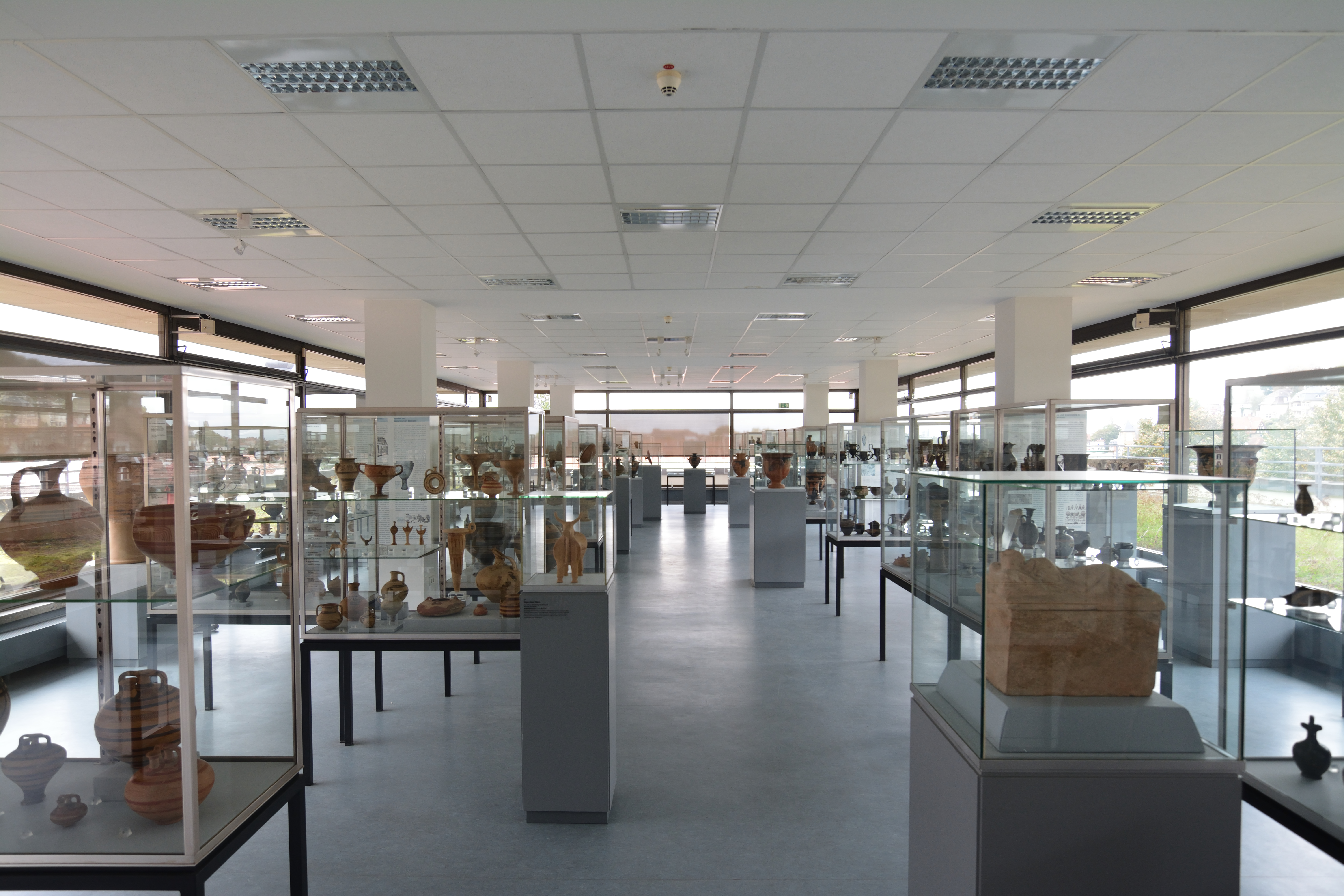 Impressionen einer Veranstaltung: GLAM-on-Tour: Antikenmuseum der Universität Heidelberg 2016 Blick in die Ausstellung